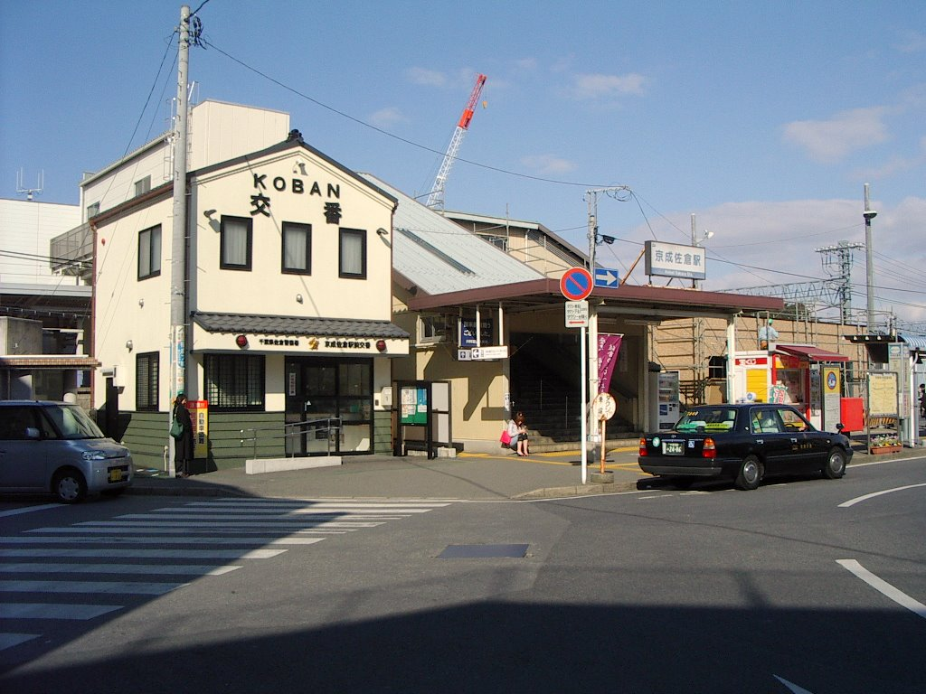 京成本線京成佐倉駅 2007年2月26日投稿者が撮影 Category:鉄道駅画像 Category:京成電鉄の画像